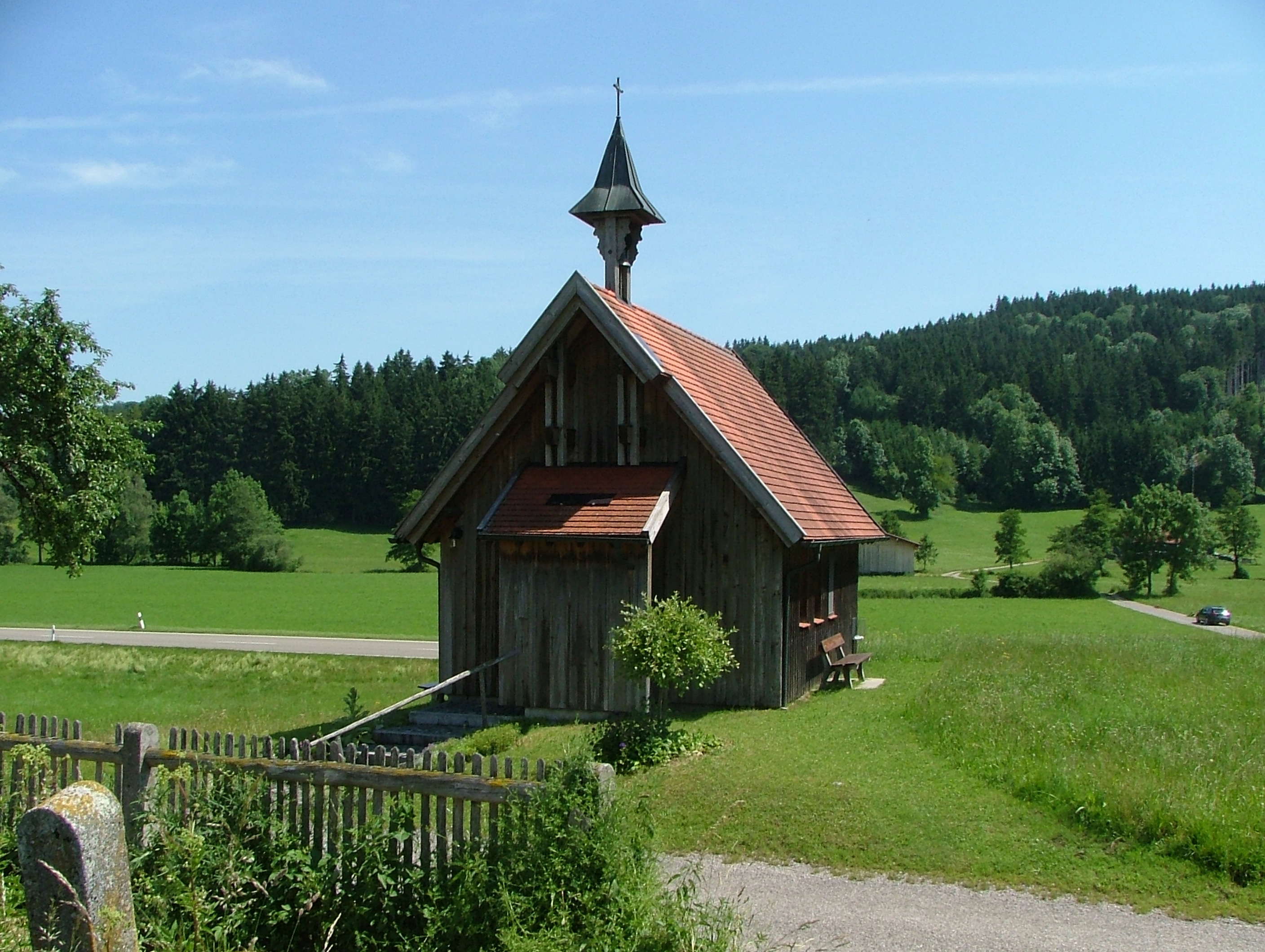 Kreuzhäusle